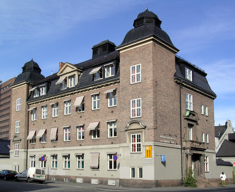 Heimdalsgata 14b, Oslo. "Luser'n", Kristiania Desinfektionsanstalt. Bygget 1914. Arkitekter: R. Dahl og Bredo Berntsen.